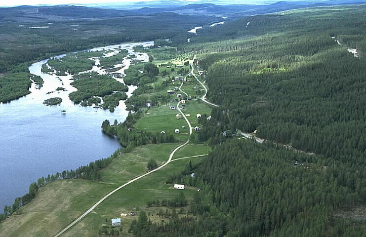 Byskeälven Motiv: Åselet Nyckelord: Flygbilder, Riksintressen Kategori: Fjällbygd Byskeälven.